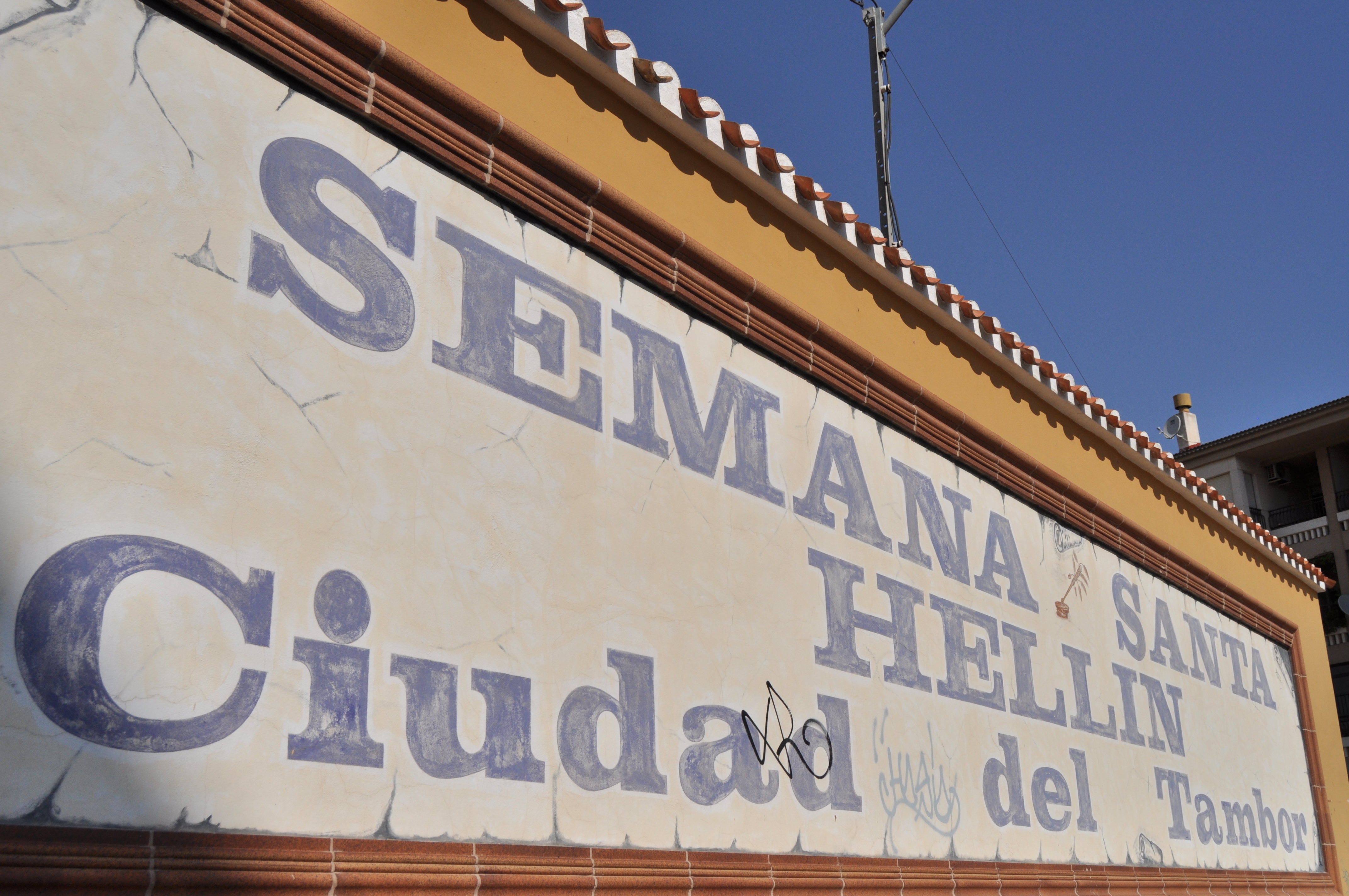 Hellin - 001